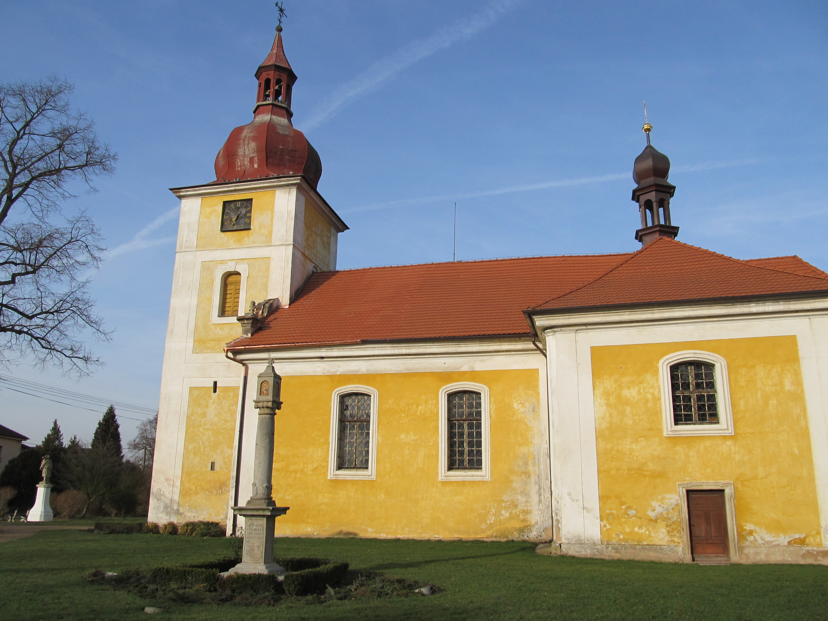 Dolní Lukavice - kostel svatého Petra a Pavla